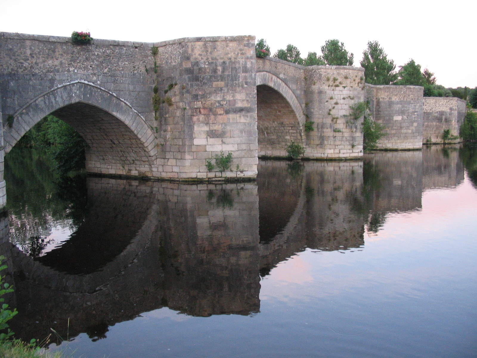 Pont du XIIe siècle emjambant la Gartempe à Saint-Savin dans la Vienne (France).